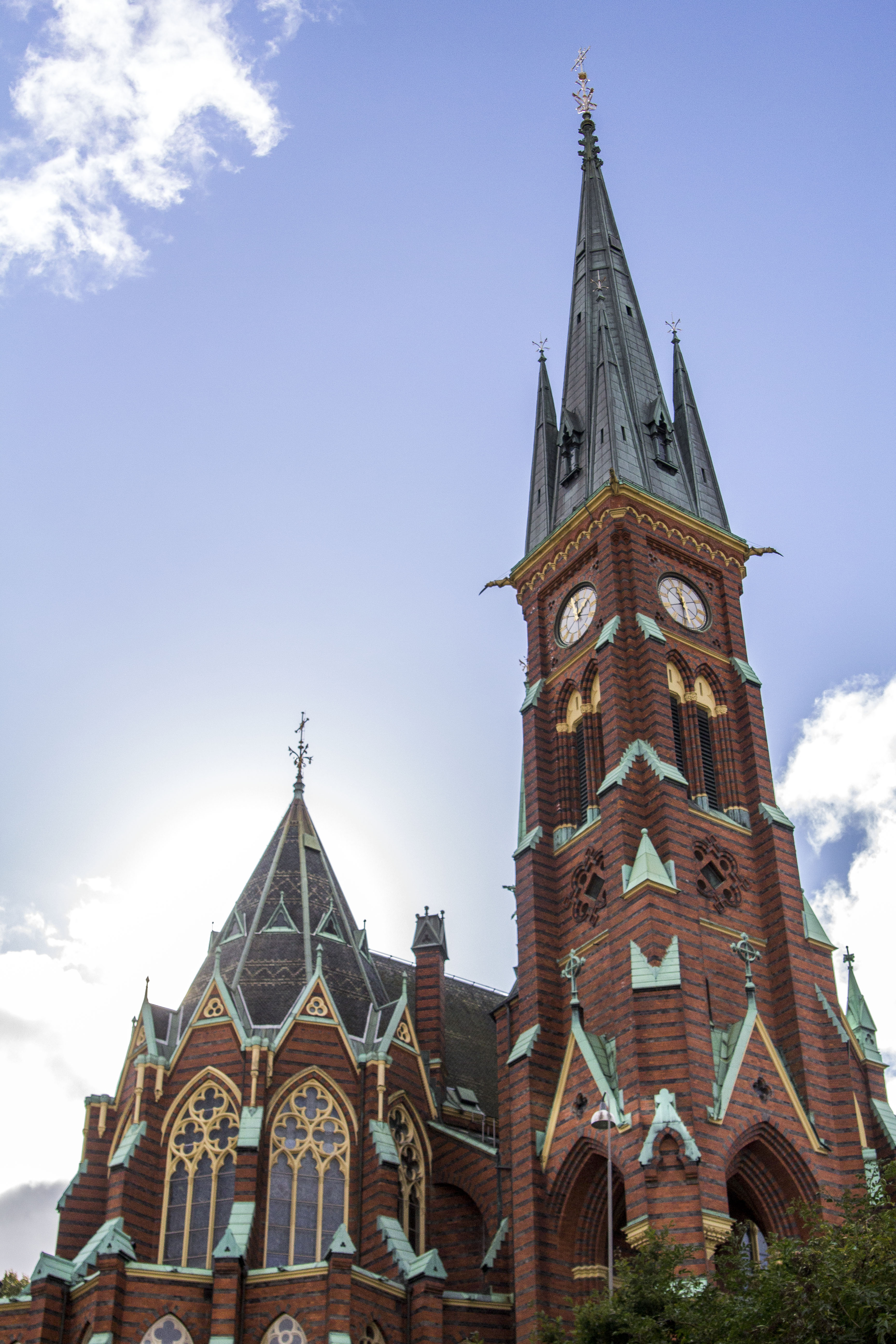 Oscar Fredriks kyrka har liknelsen av ett slott och ligger i Göteborg.